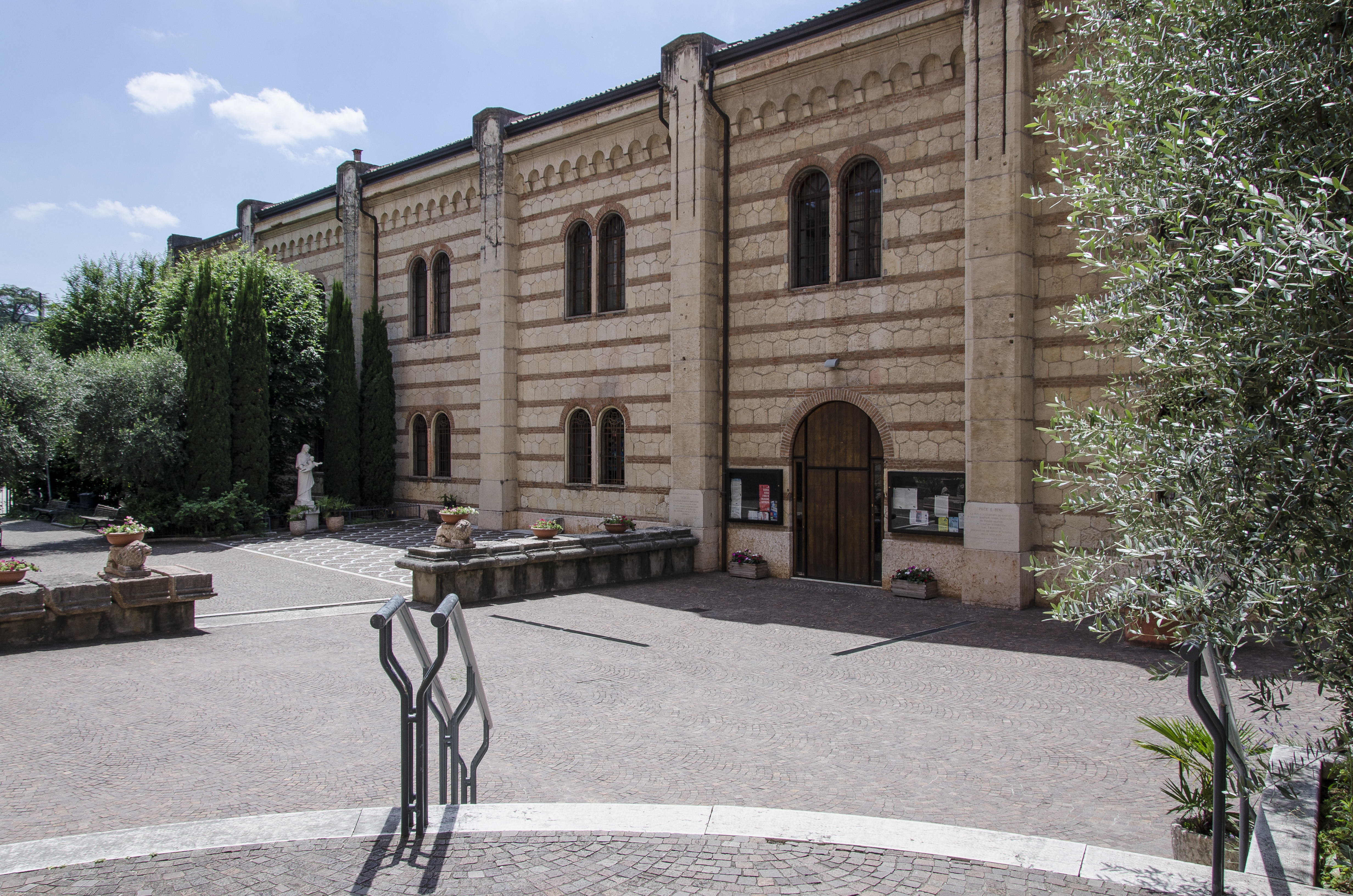 Chiesa di San Francesco d'Assisi presso l'arsenale di Verona